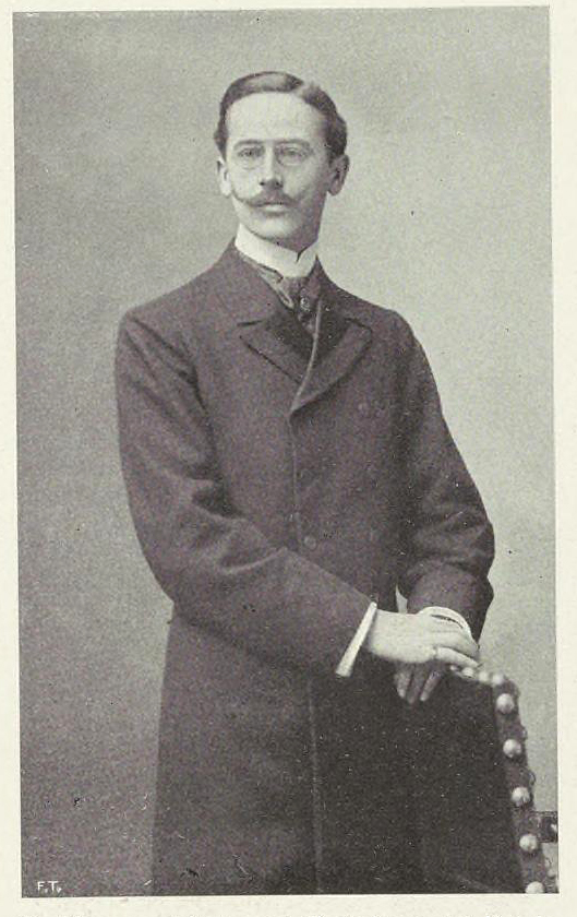 Arch. Henri Vaes (1876-1945)